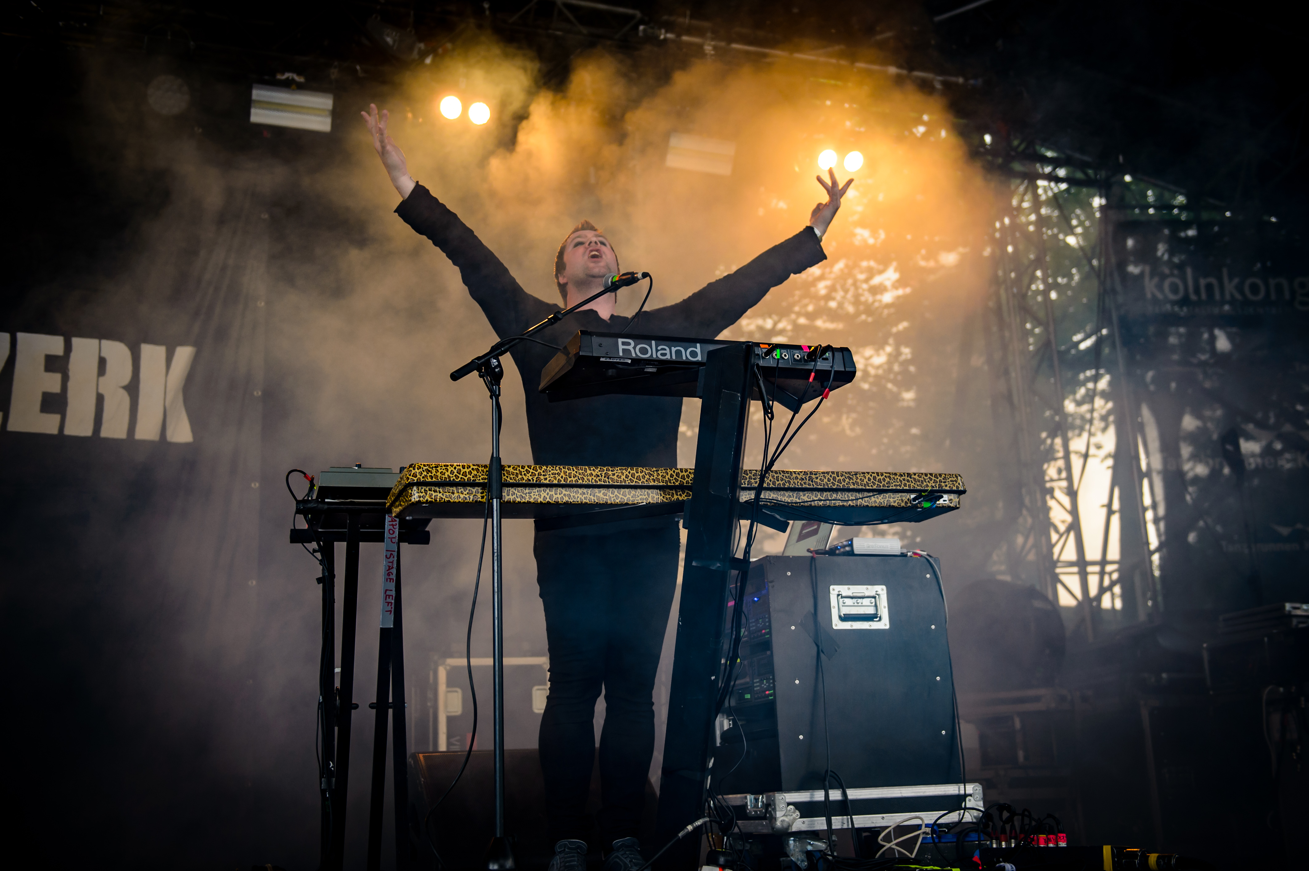 'Amphi Festival 2017; Tanzbrunnen Köln': 'Apoptygma Berzerk'